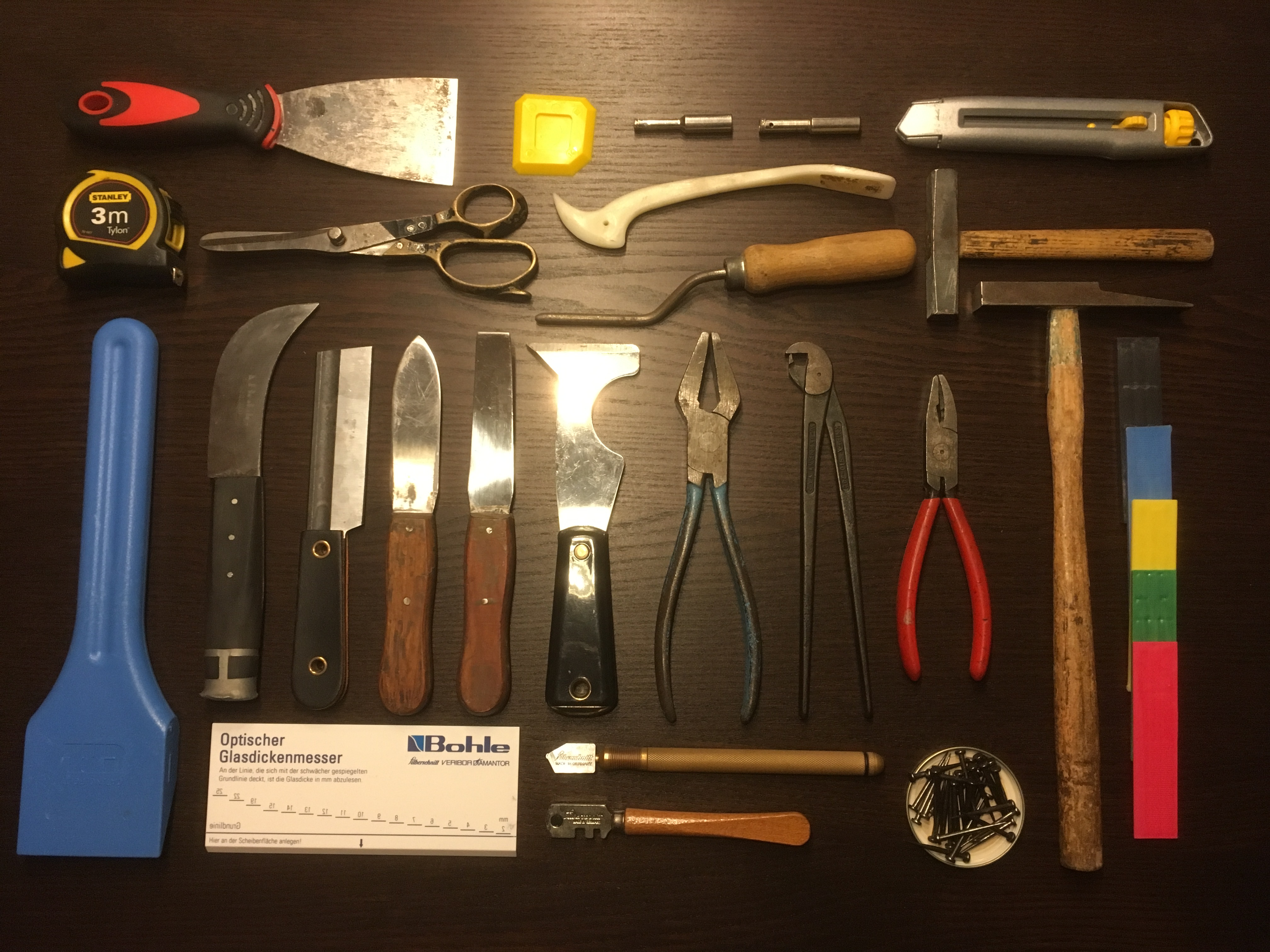 Glaserwerkzeuge